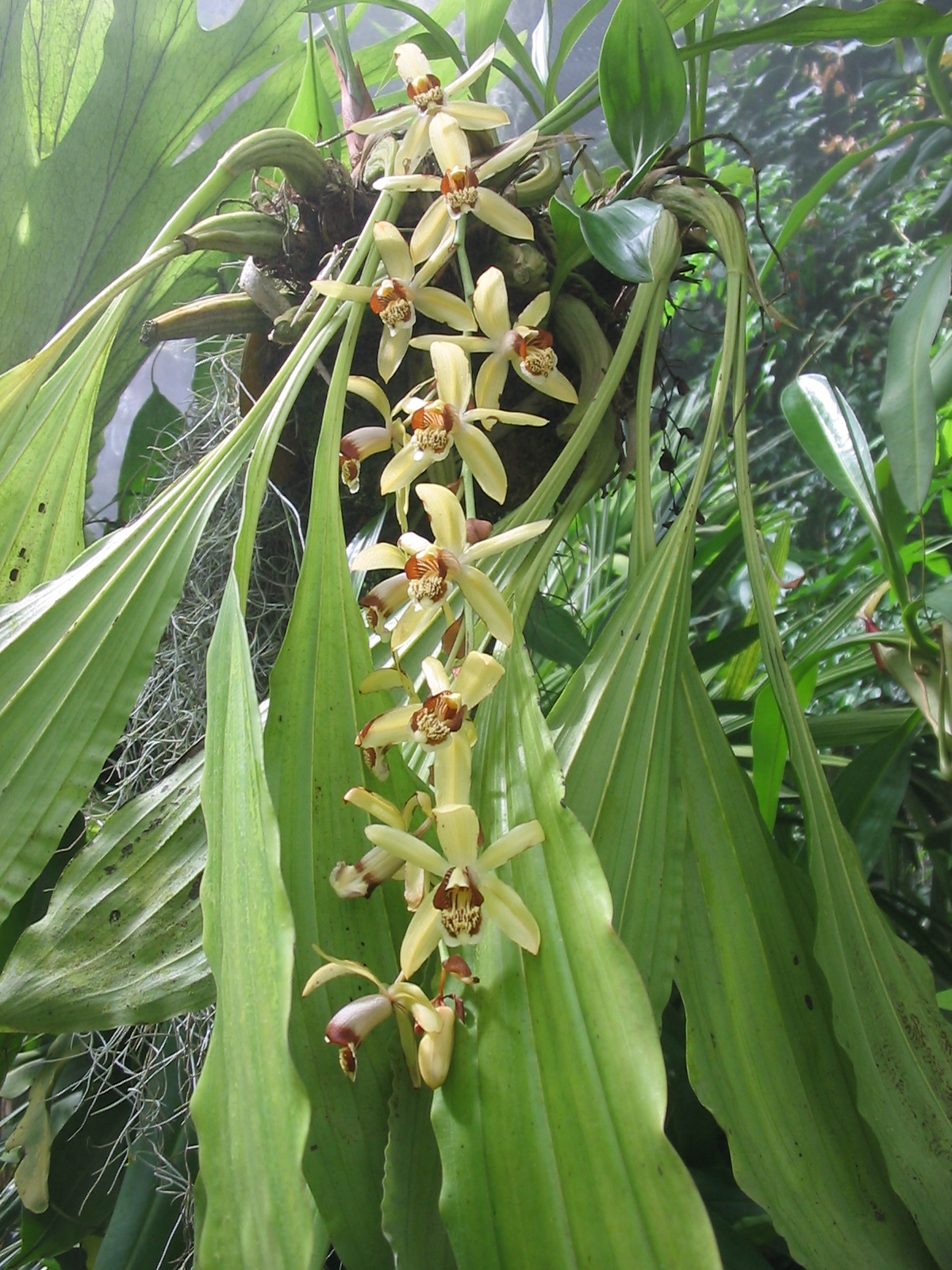 Pablo Alberto Salguero Quiles